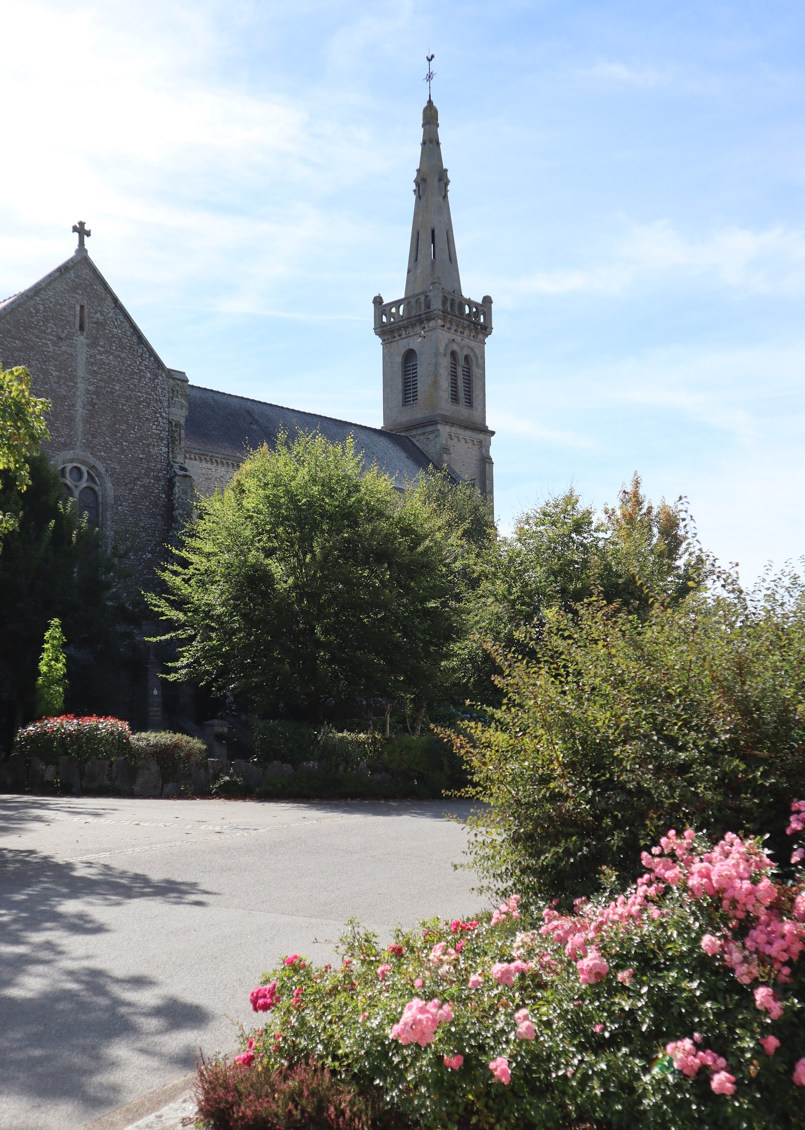 Église Saint-Gentien de Pluherlin (56). Extérieur. Flanc nord.